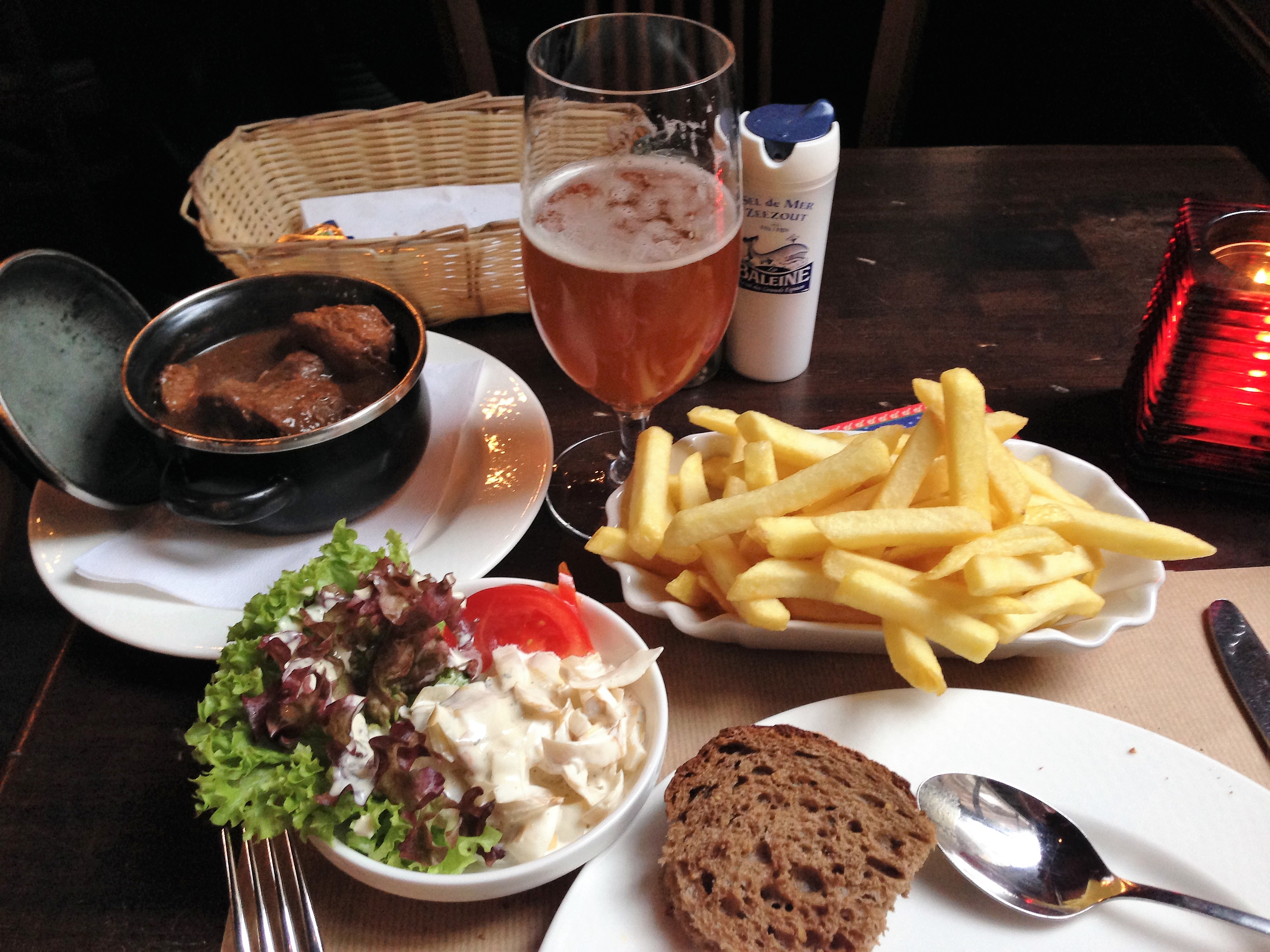 Stoofvlees (Flämische Karbonade) mit Pommes frites, Chicoréesalat und Brot sowie mit einem belgischen Bier (Arend Blond). Typische flämische Mittagsmahlzeit, hier in dem Restaurant De Groote Witte Arend in Antwerpen, Belgien.